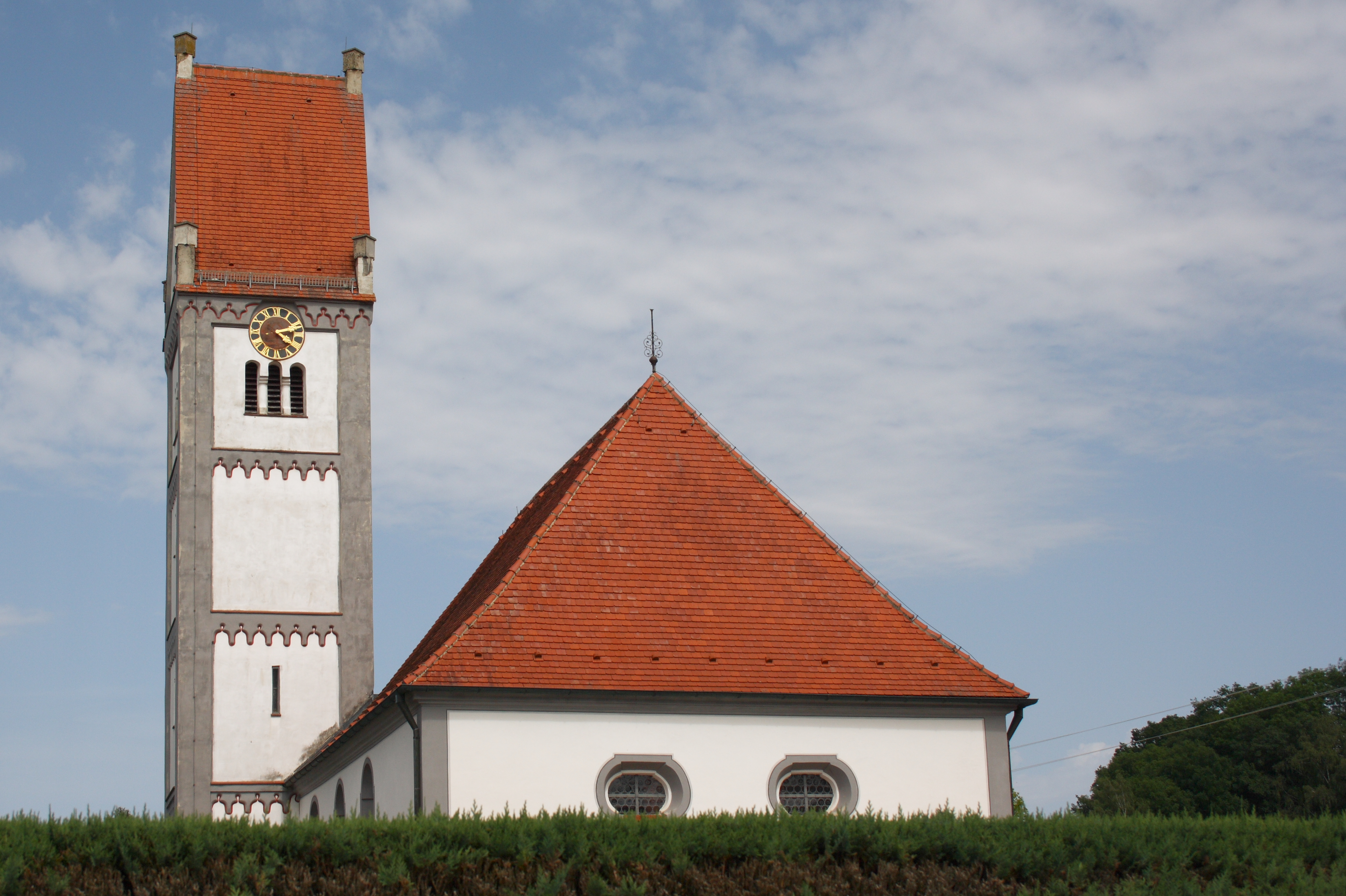 Katholische Pfarrkirche St. Peter und Paul in Ried (Jettingen-Scheppach) im Landkreis Günzburg (Bayern)